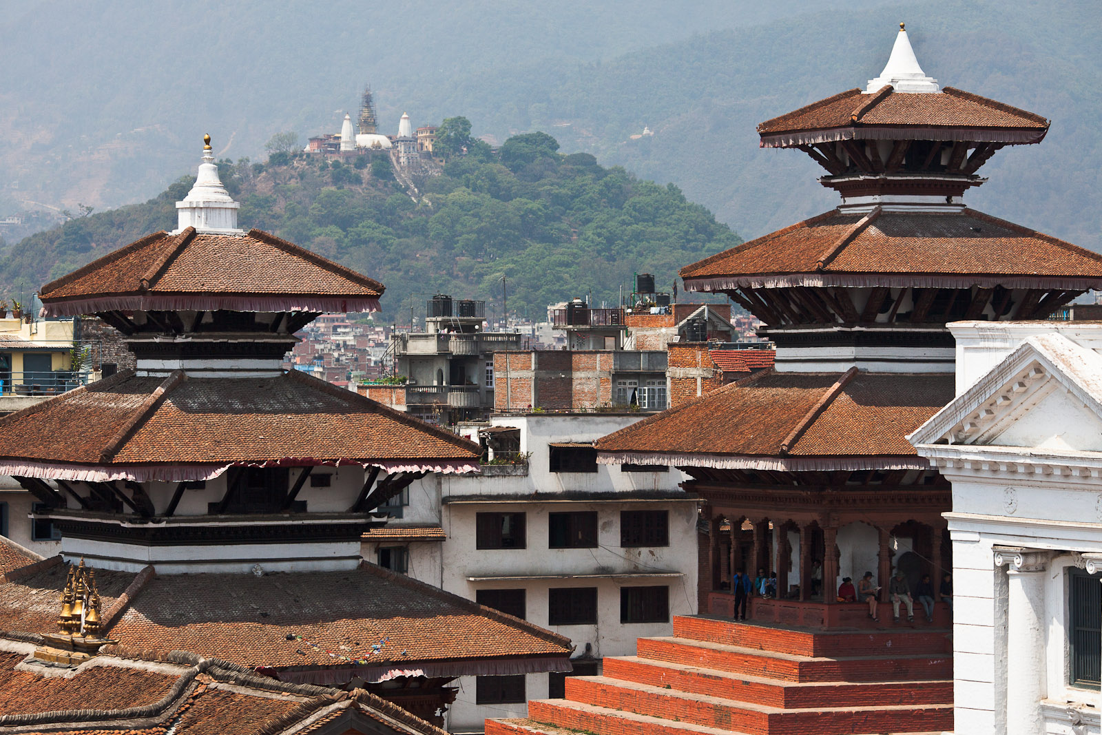 Kathmandu Durbar Square